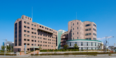 関西学研医療福祉学院の外観です。